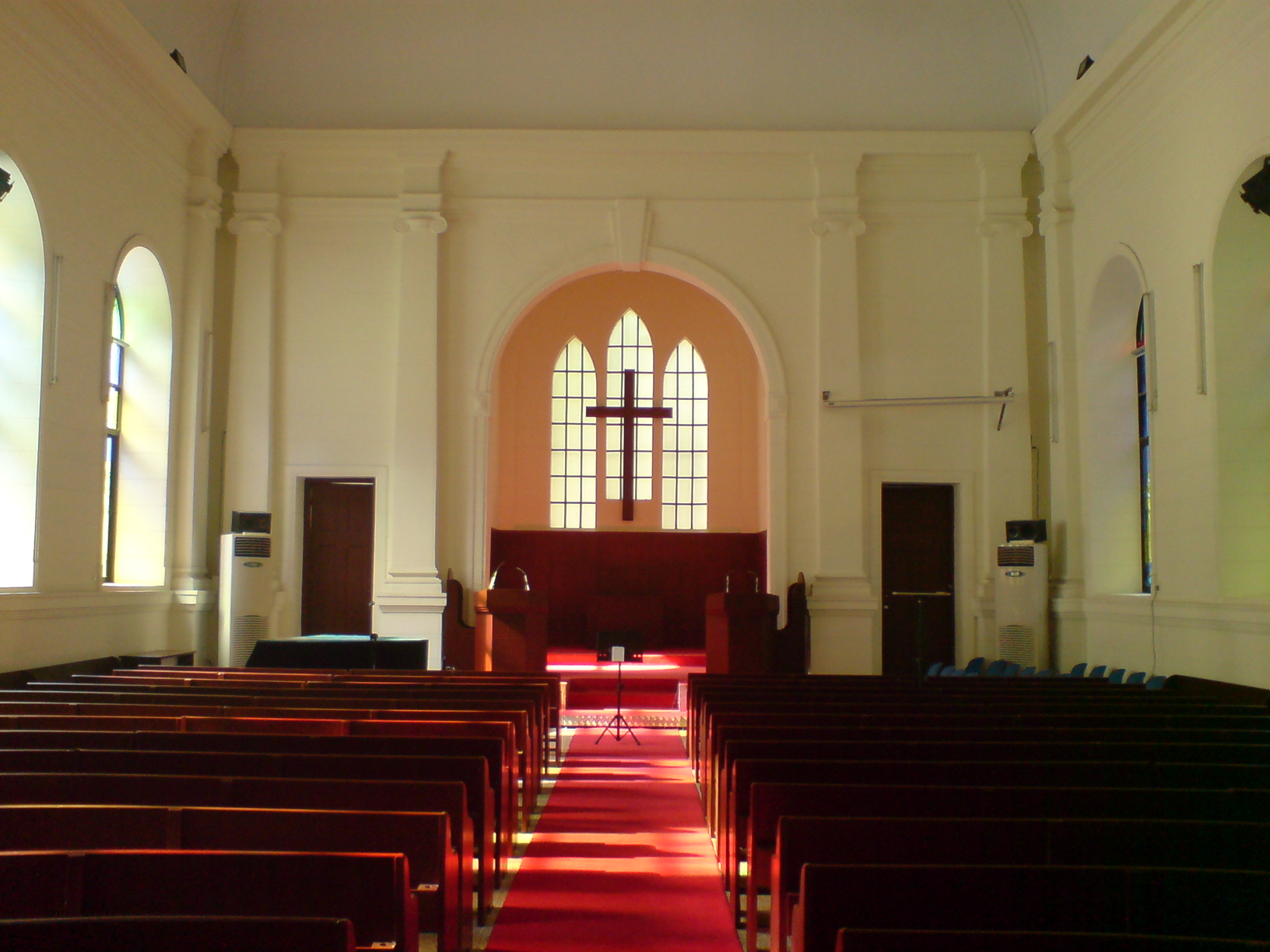 中文（中国大陆）: 广州基督教沙面堂